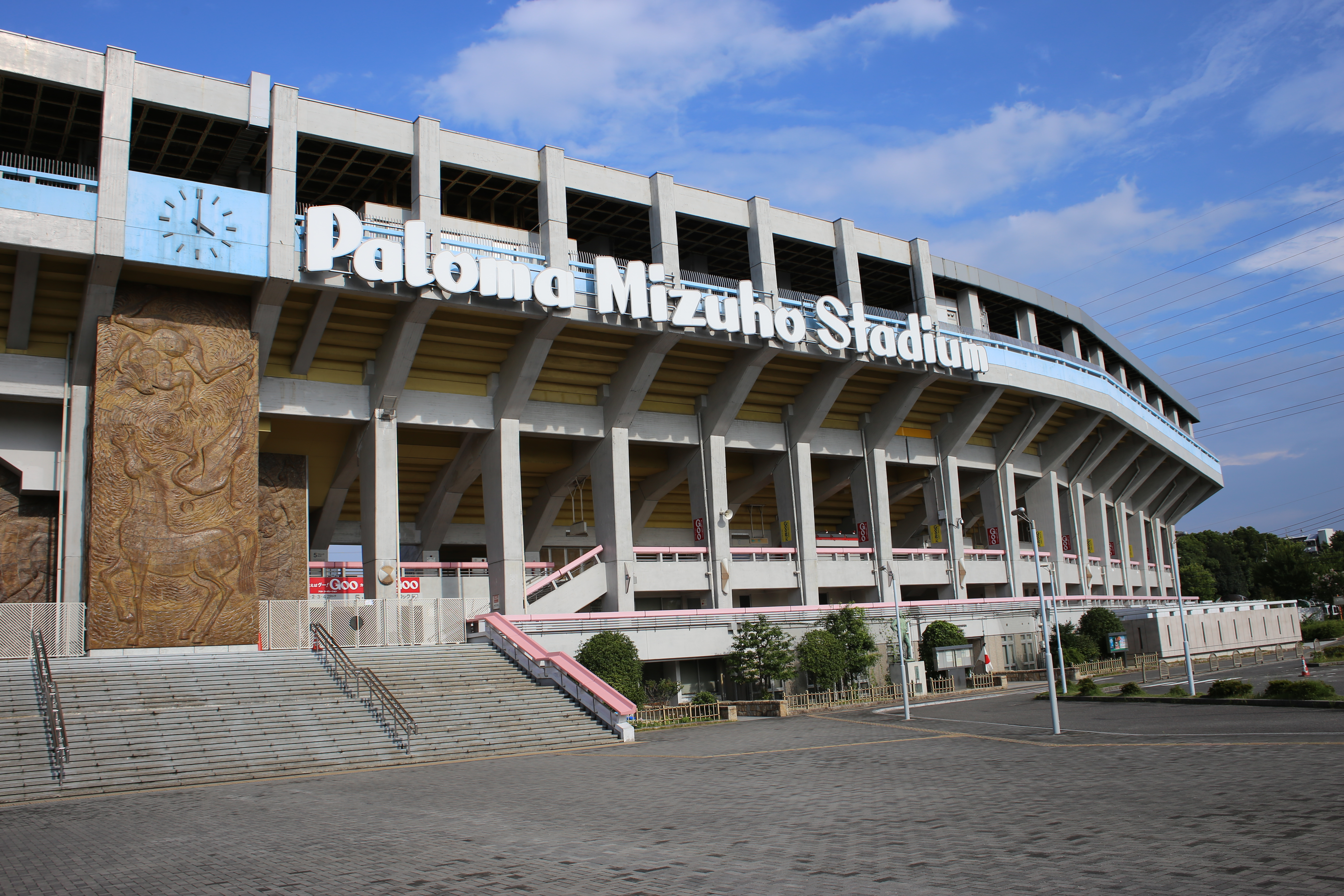 名古屋市瑞穂区の瑞穂公園スタジアム